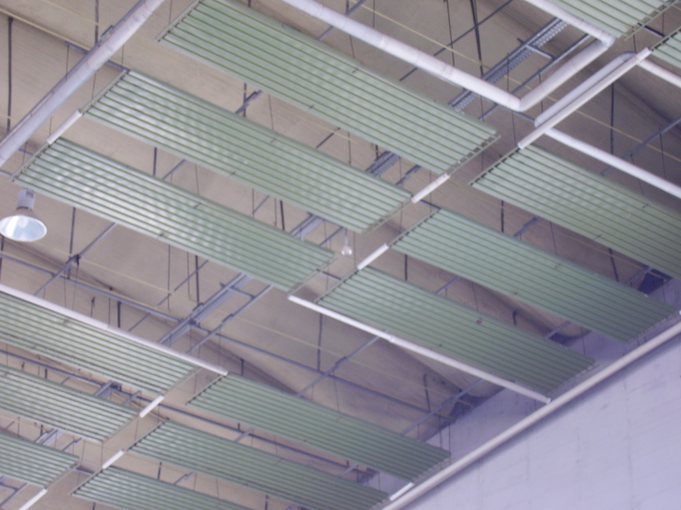 ILA 2008